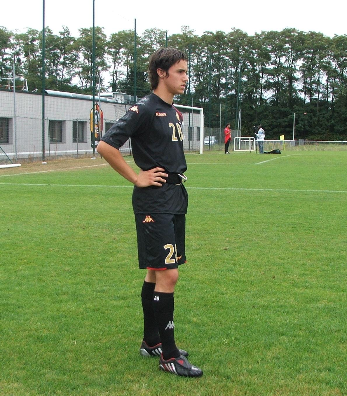 Le jeune international espoir français Sébastien Corchia photographié lors de l'entrainement du MUC 72, le jeudi 27 Août 2009.